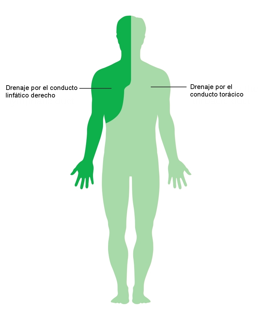 Diagrama en el que se muestra las partes del cuerpo humano que drenan la linfa a través del conducto linfático derecho y el conducto torácico.